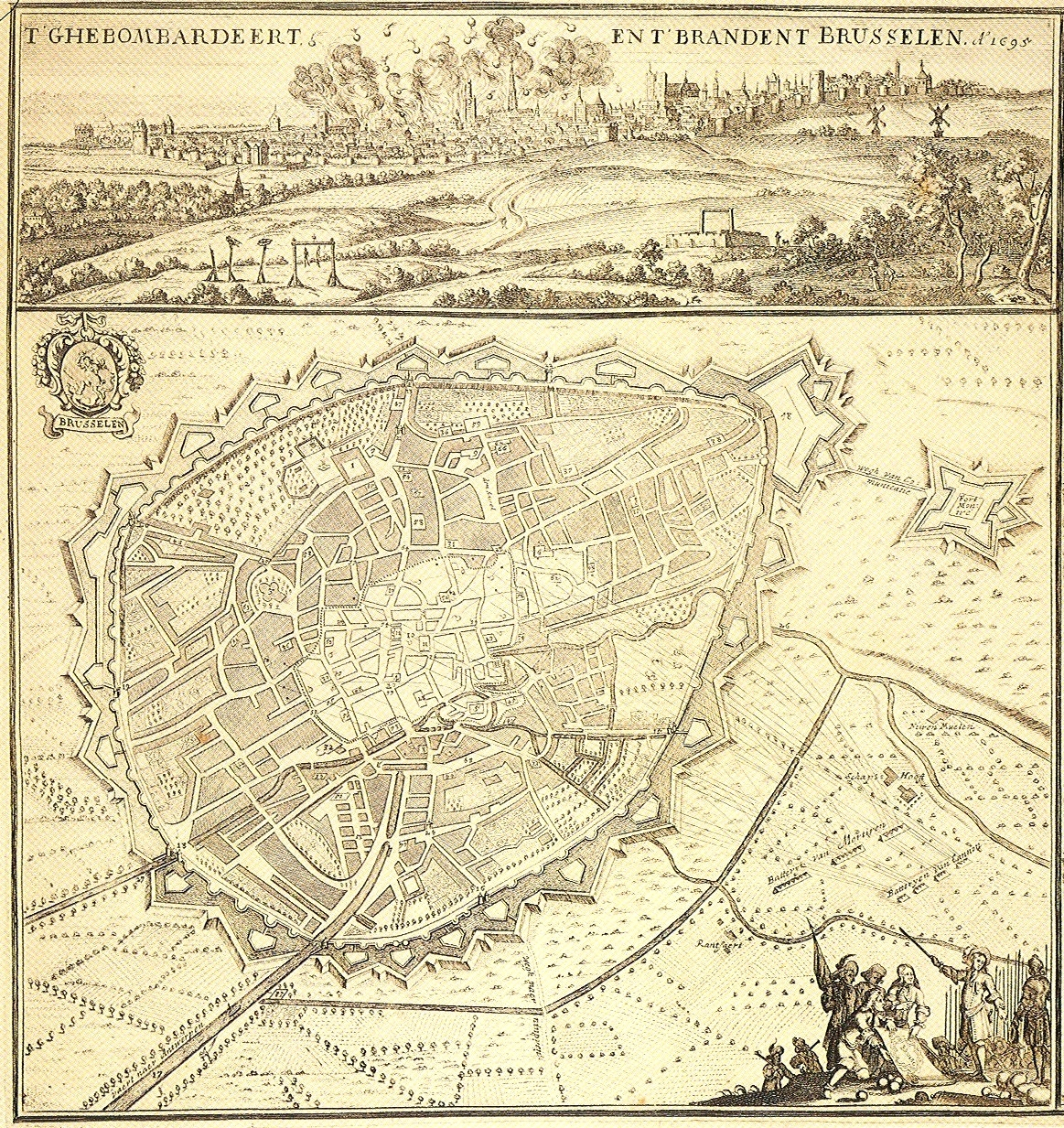 Bombardement et incendie de Bruxelles en 1695 par les troupes françaises de Louis XIV, détail de la carte ’t Ghebombareert ent brandent Brusselen 1695, imprimée à Anvers par Gaspar Bouttats